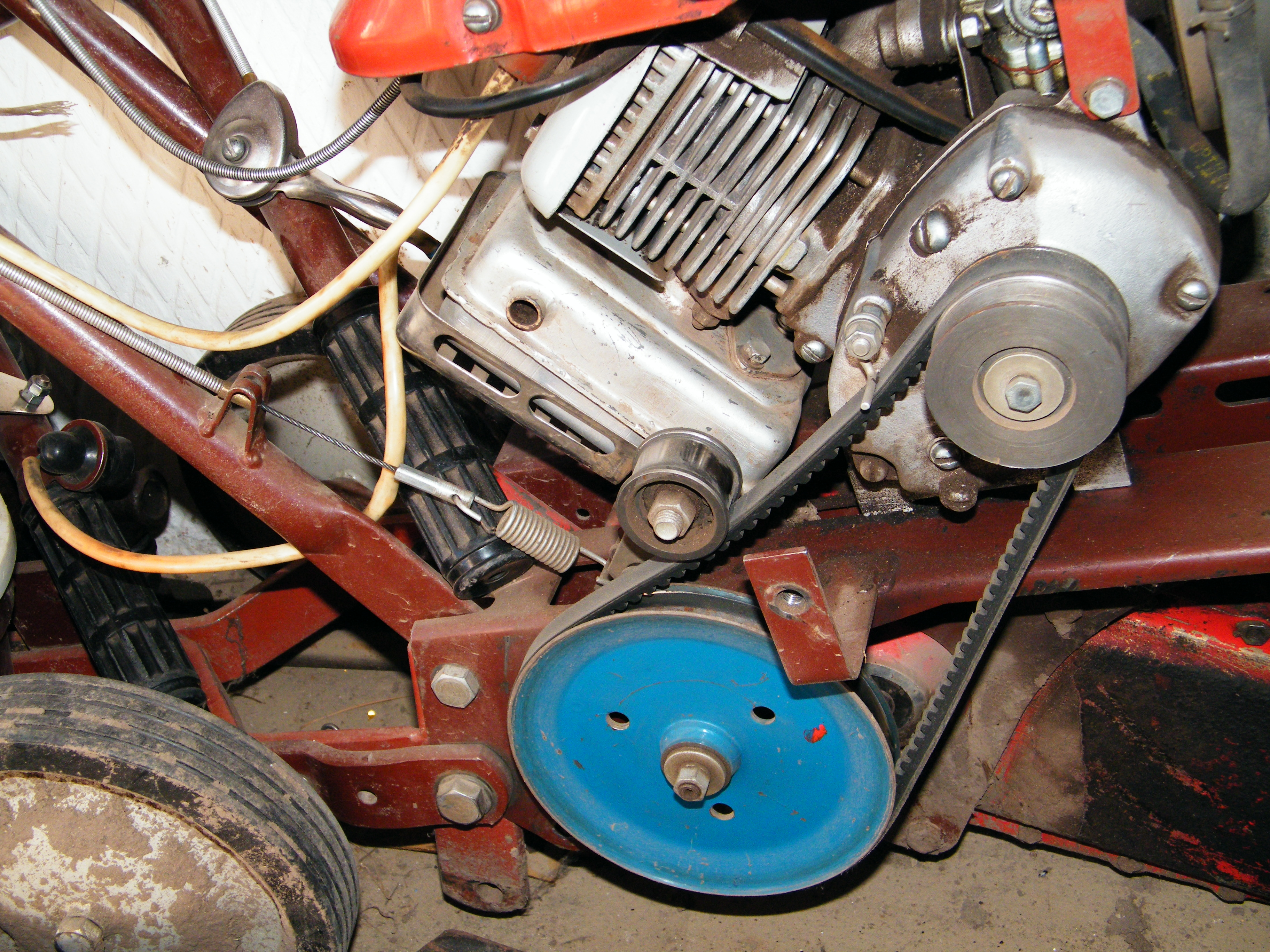 Клиноременная трансмиссия мотокультиватора "Крот"